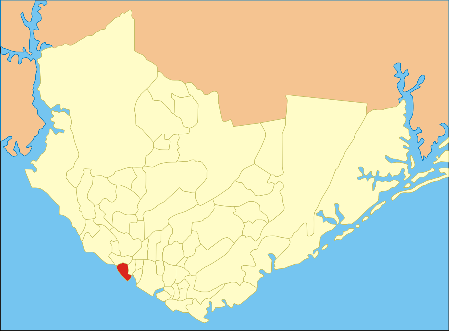 Localização do bairro em Manaus